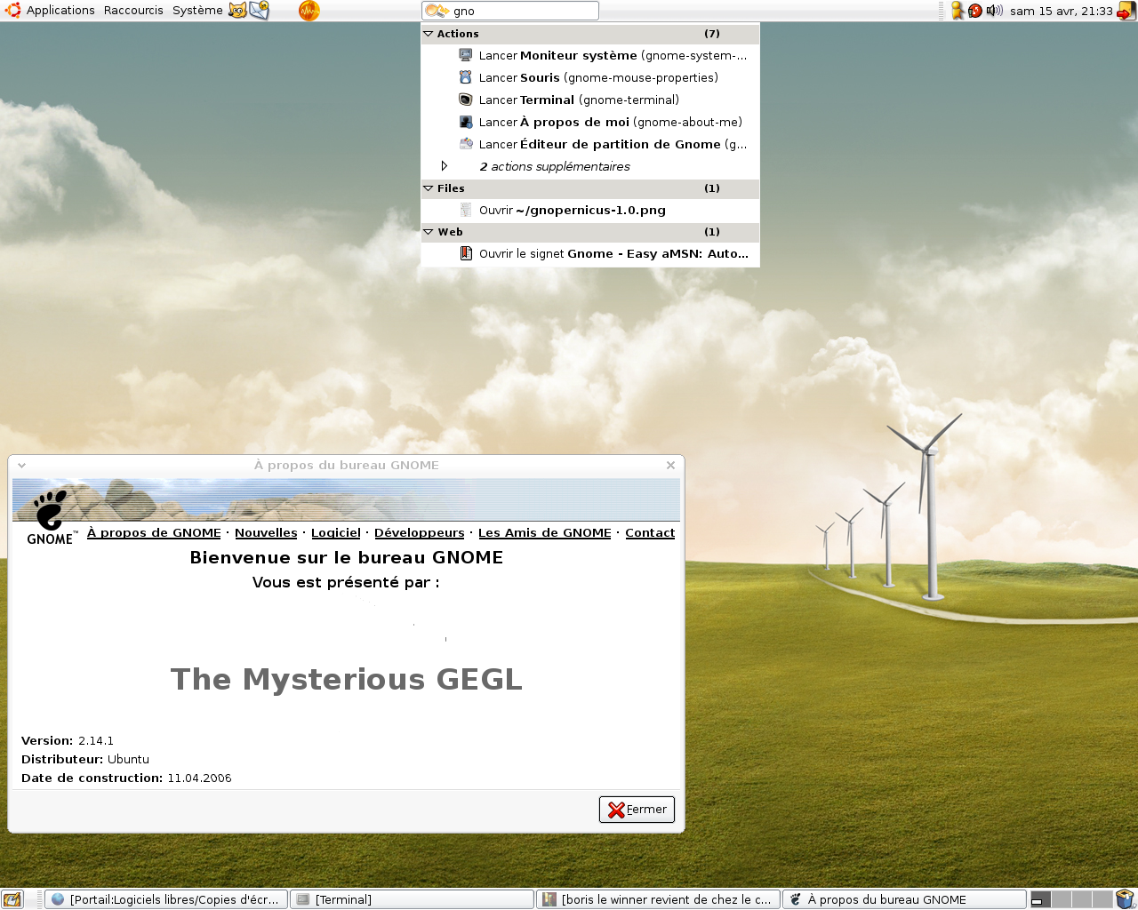 gnome 2.14 (ubuntu dapper) interface gtk2 avril 2006 Licensing Catégorie:Image de logiciel libre